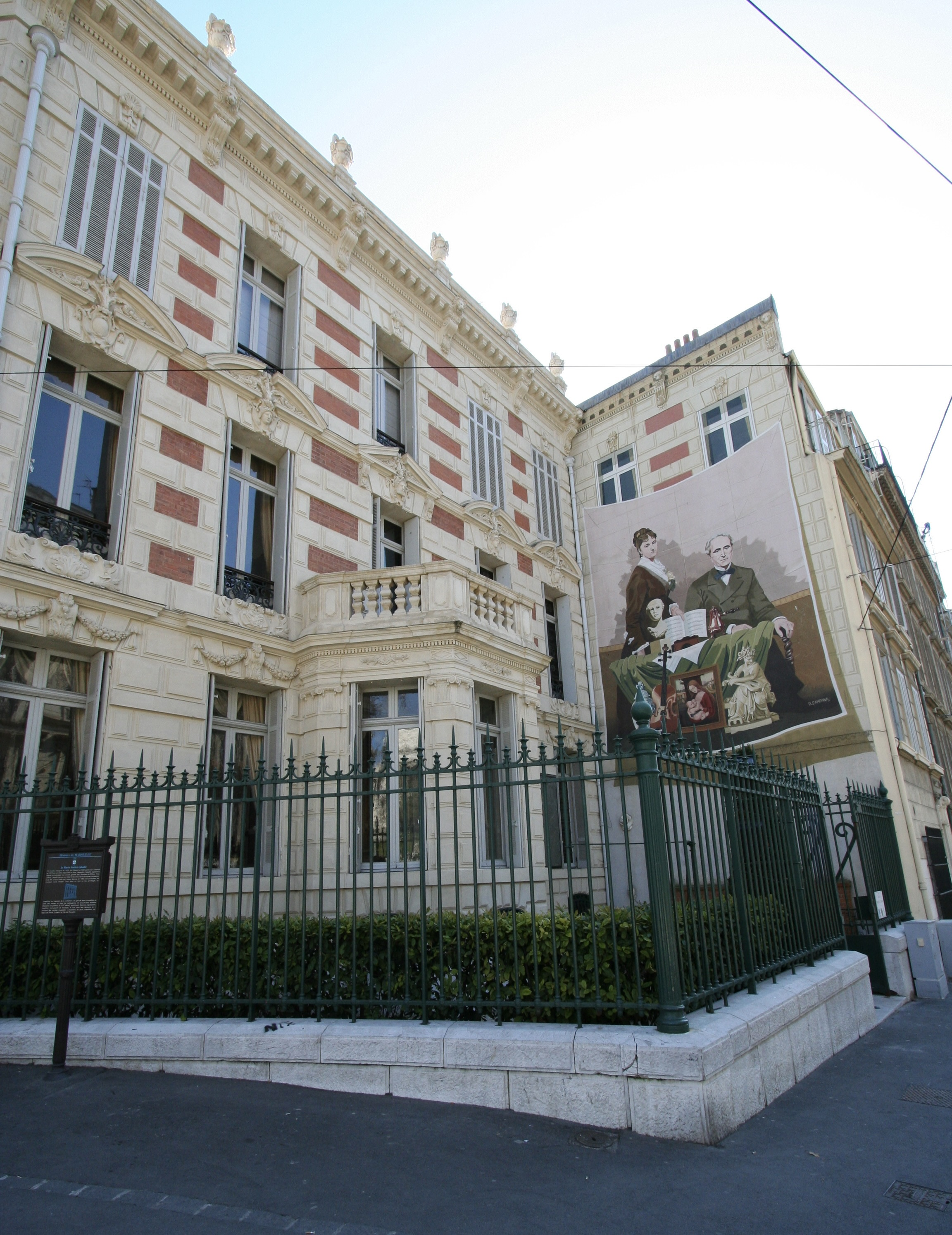 Musée Grobet-Labadié à Marseille, hôtel particulier du XIXe siècle.